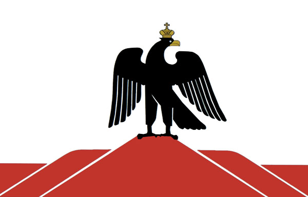 Флаг города Орска